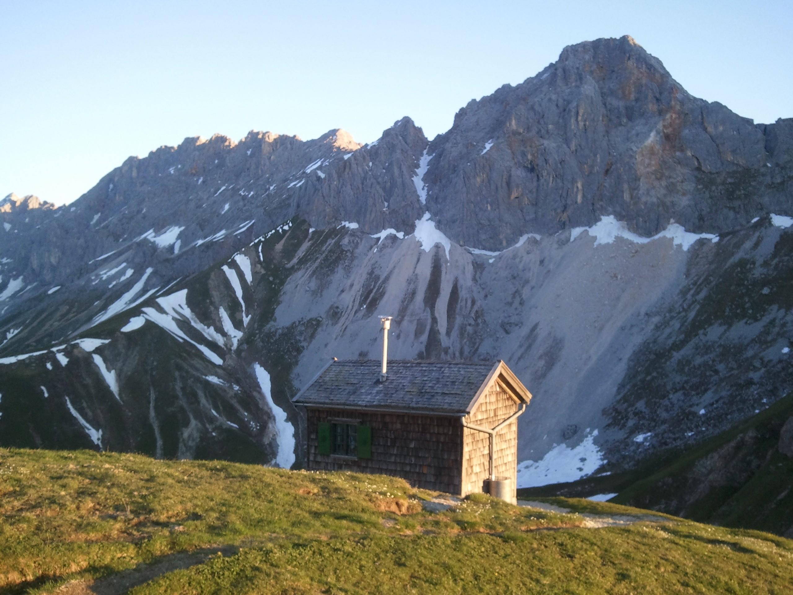 Erinnerungshütte des Akademischen Alpenverein München 2012